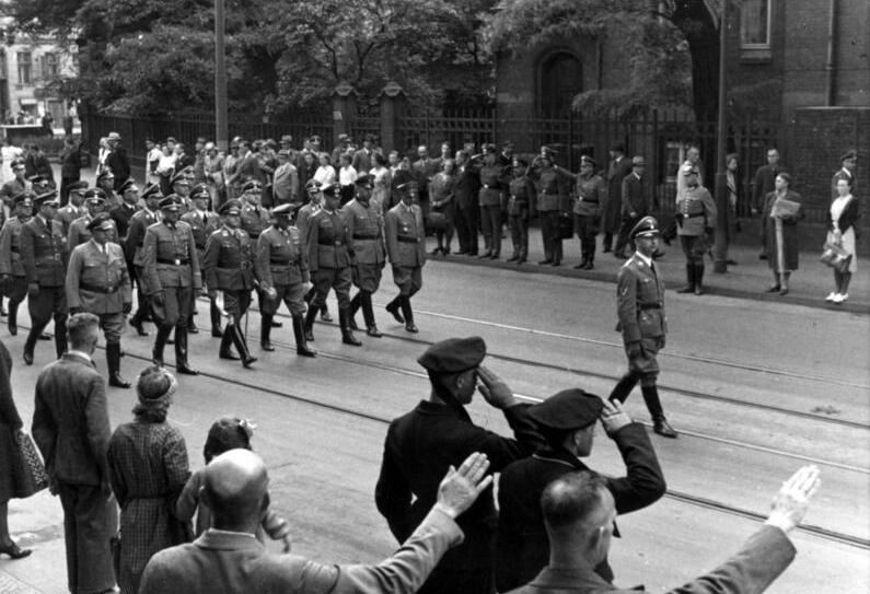 Reichsführer SS Himmler im Trauerzug